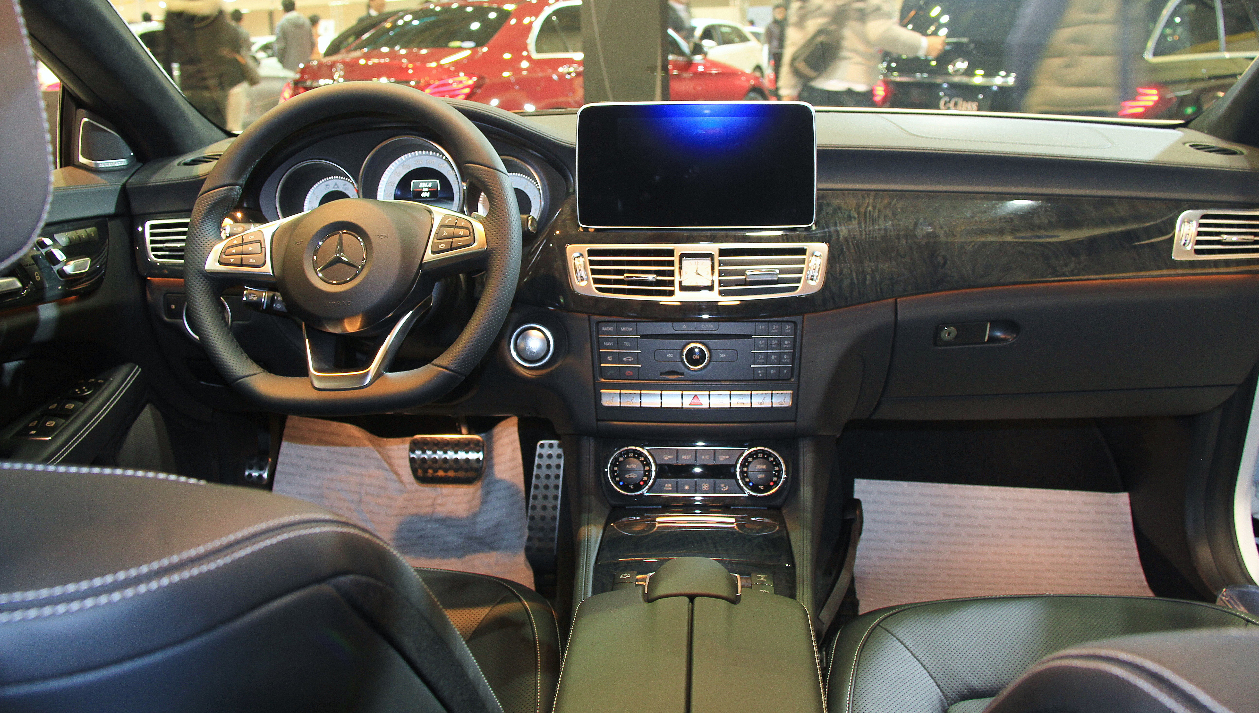 Mercedes CLS550